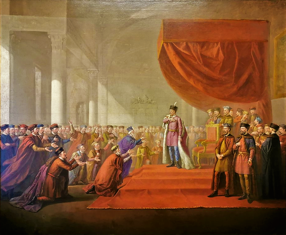 польский король Стефан Баторий основывает Виленский университет, картина Викентия Смоковского